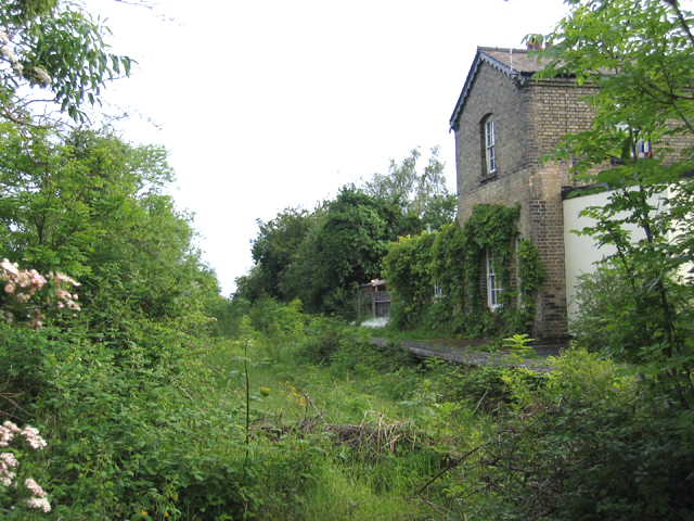 Oakington Halt, Oakington, Cambs